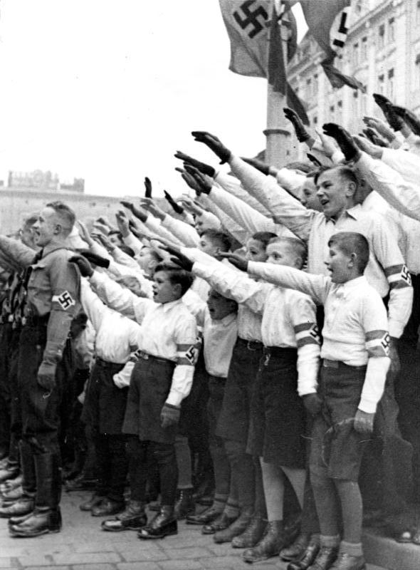 Posen, Amtseinführung Arthur Greiser Die feierliche Amtseinführung des Reichsstatthalters und Gauleiters Greiser durch Reichsinnenminister Dr. Frick in Posen. Die deutsche Jugend Posens jubelt Reichsminister Dr. Frick begeistert zu. Fot. Ho. 3.11.39 12915-39